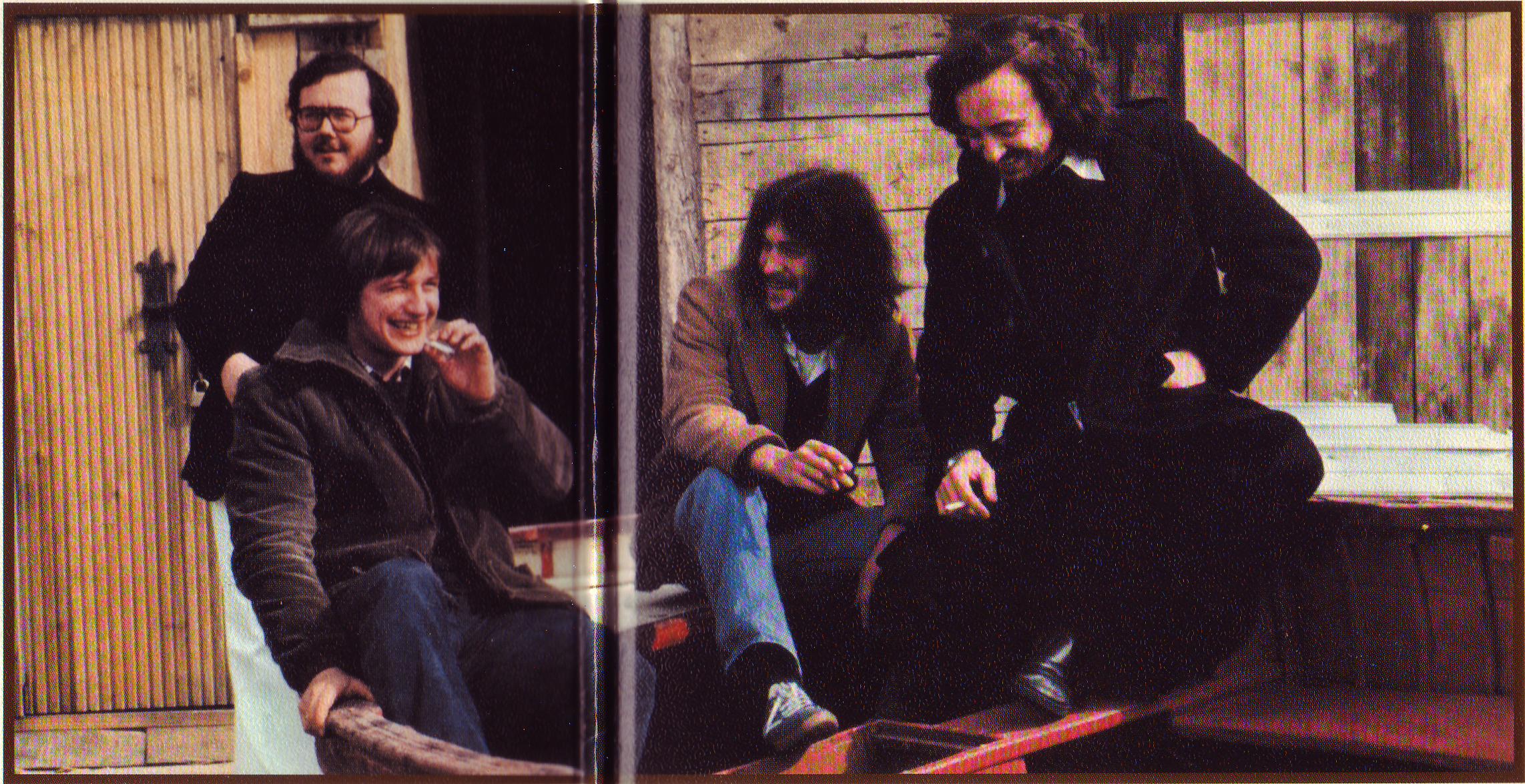 Primera formació de Gòtic